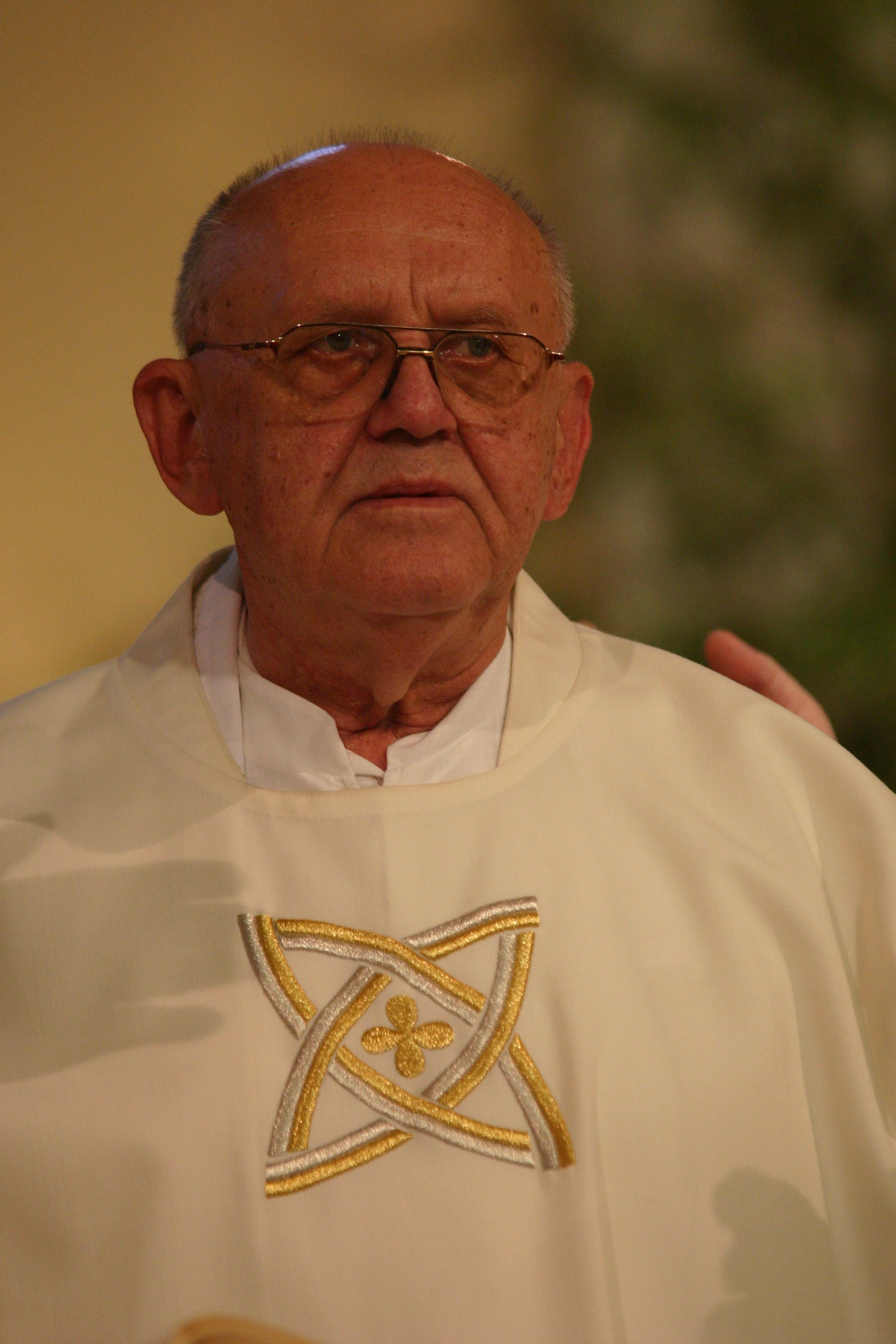 Kanovník Vladislav Kara v katedrále sv. Štěpána v Litoměřicích